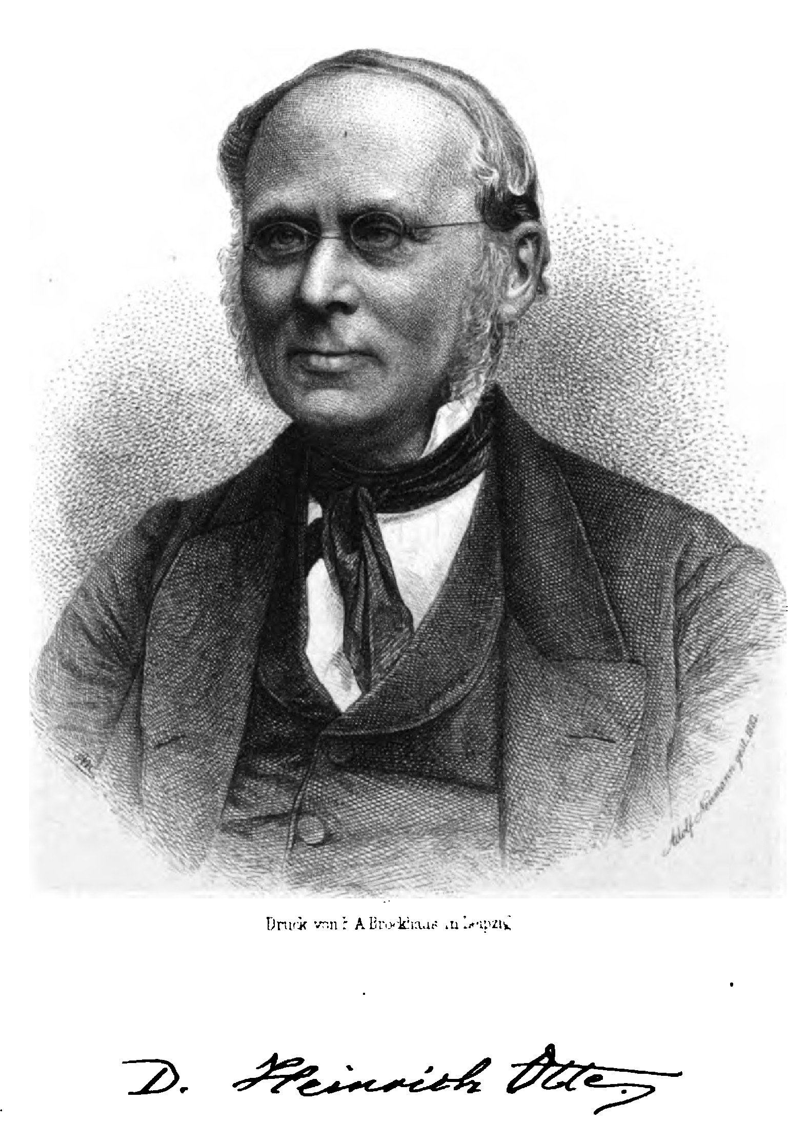 Heinrich Otte. In: Handbuch der kirchlichen Kunst-archäologie des deutschen Mittelalters. 5. Auflage. Leipzig: Weigel, 1883